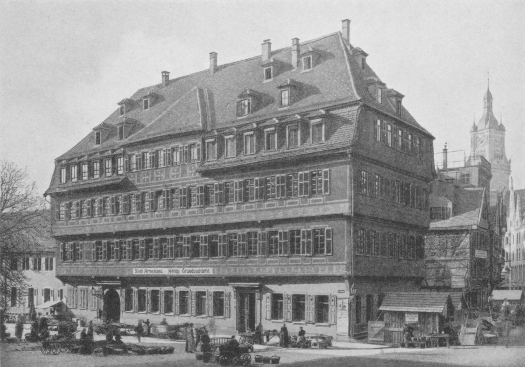 Stuttgart. Gasthof „König von England“ in der Dorotheenstraße 2, erbaut 1798, Foto.